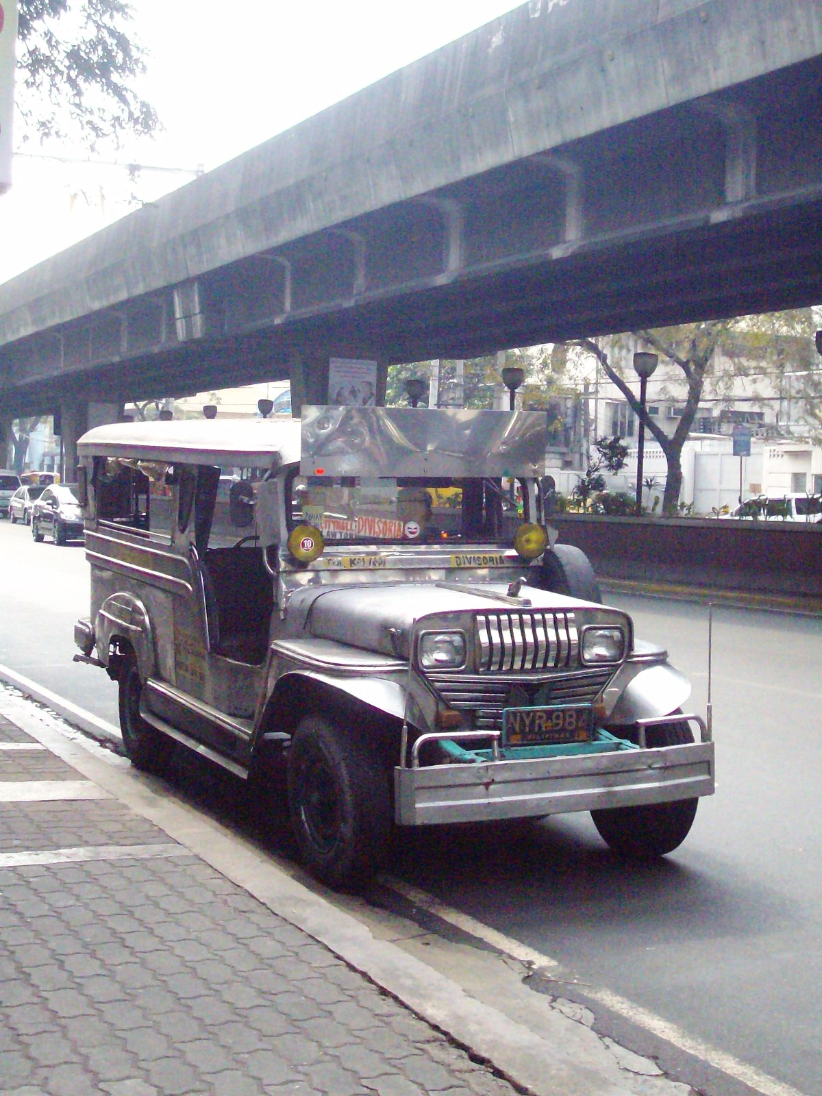 Jeepney in Manila, Philippines